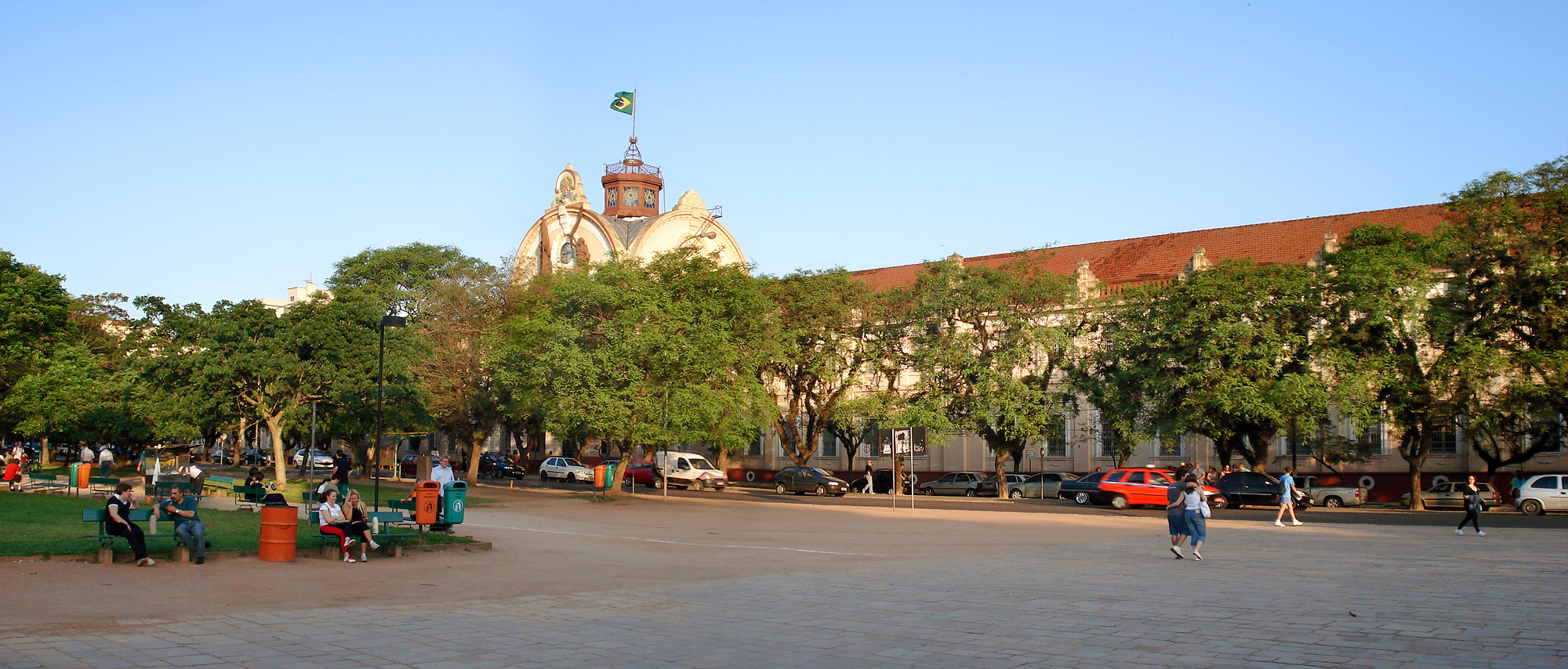 Colégio Militar de Porto Alegre, Brasil.